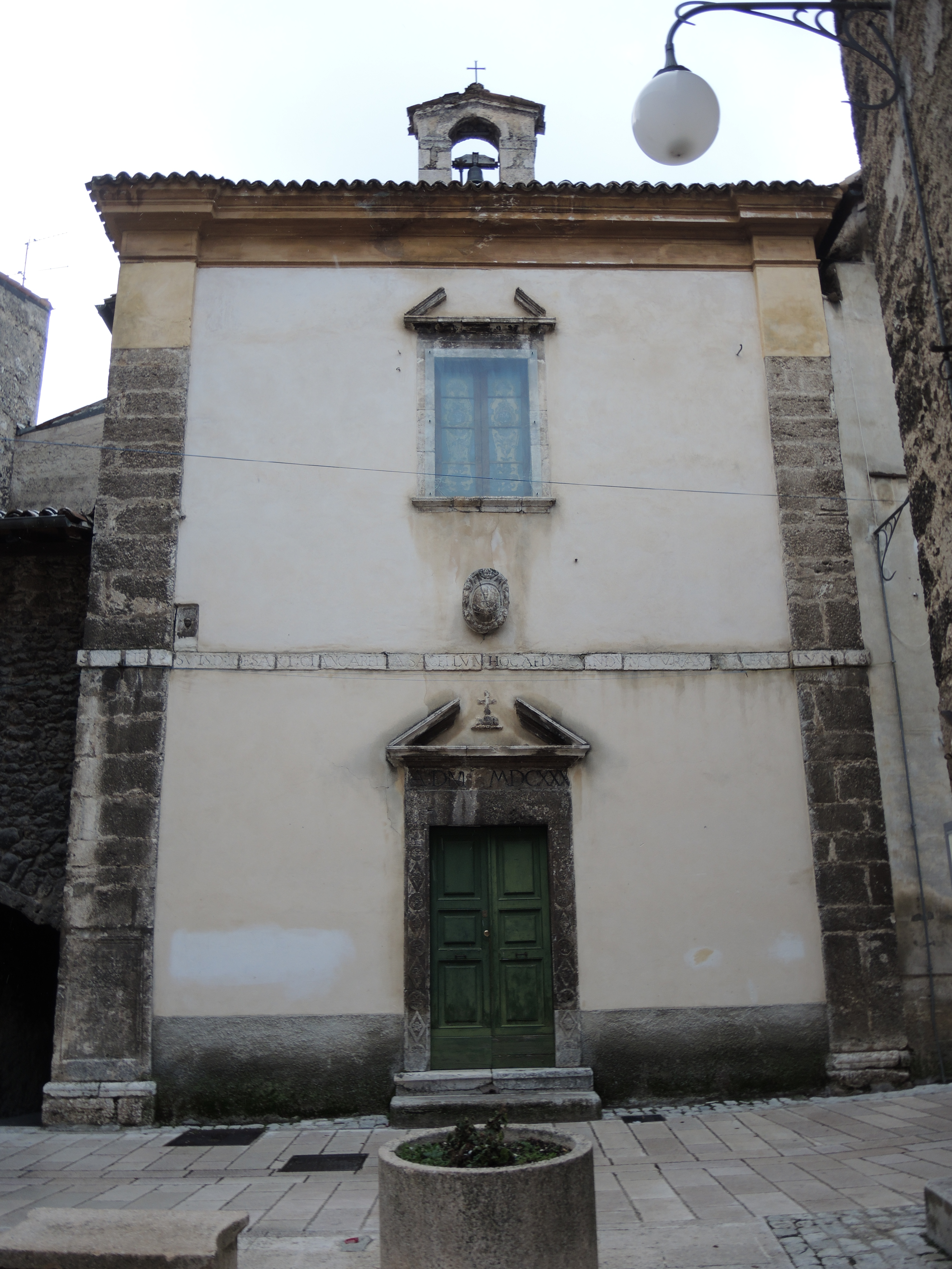 Scanno